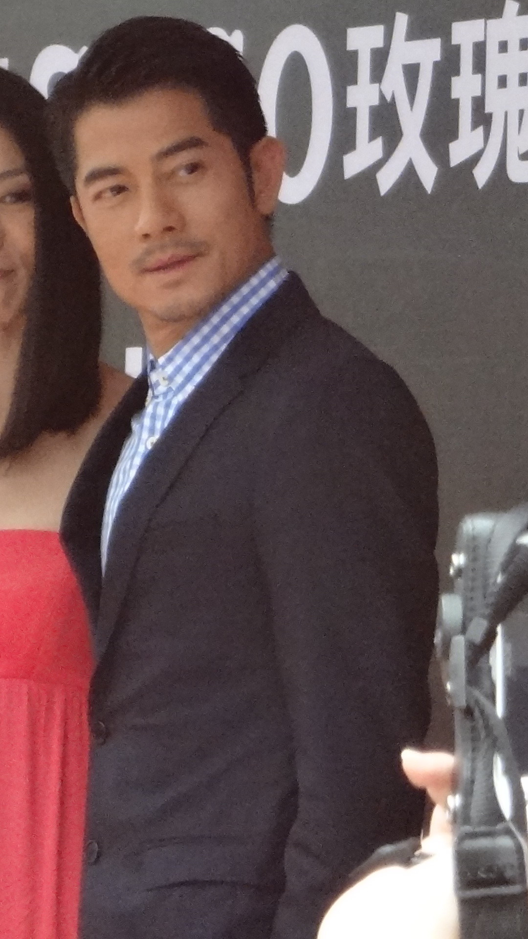 中文（台灣）: 2013年5月18日，郭富城在太平洋崇光百貨臺北忠孝館宣傳電影《聖誕玫瑰》。